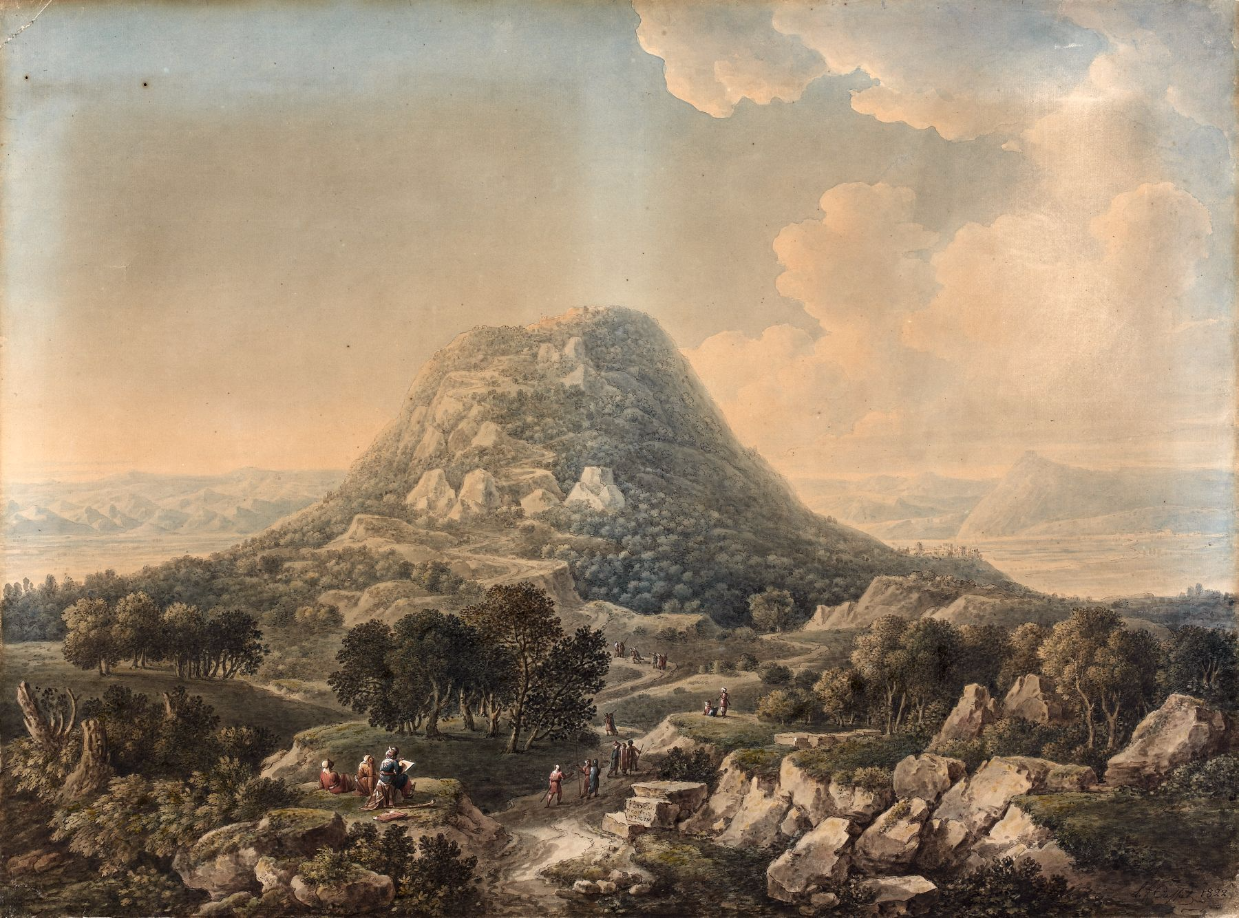 Vue du Mont Thabor en Galilée prise du côté du chemin de Nazareth Plume et encre de Chine, aquarelle gouachée partiellement vernie sur papier marouflé sur toile Signé et daté 'L F Cassas 1822' en bas à droite Hauteur : 48 cm Largeur : 66 cm